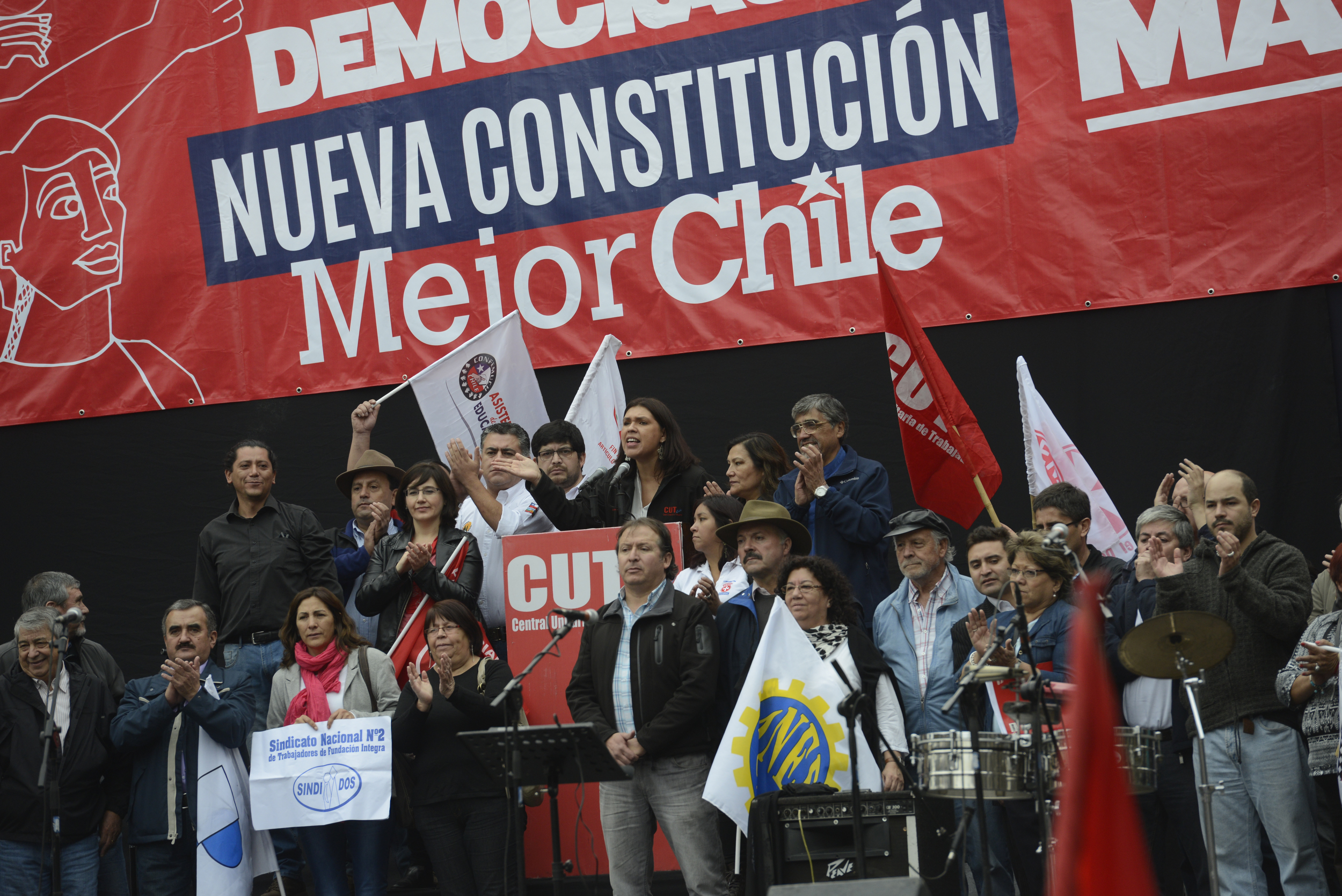 01/05/15 Ministro Álvaro Elizalde participa en acto de conmemoración del Dia del Trabajador.